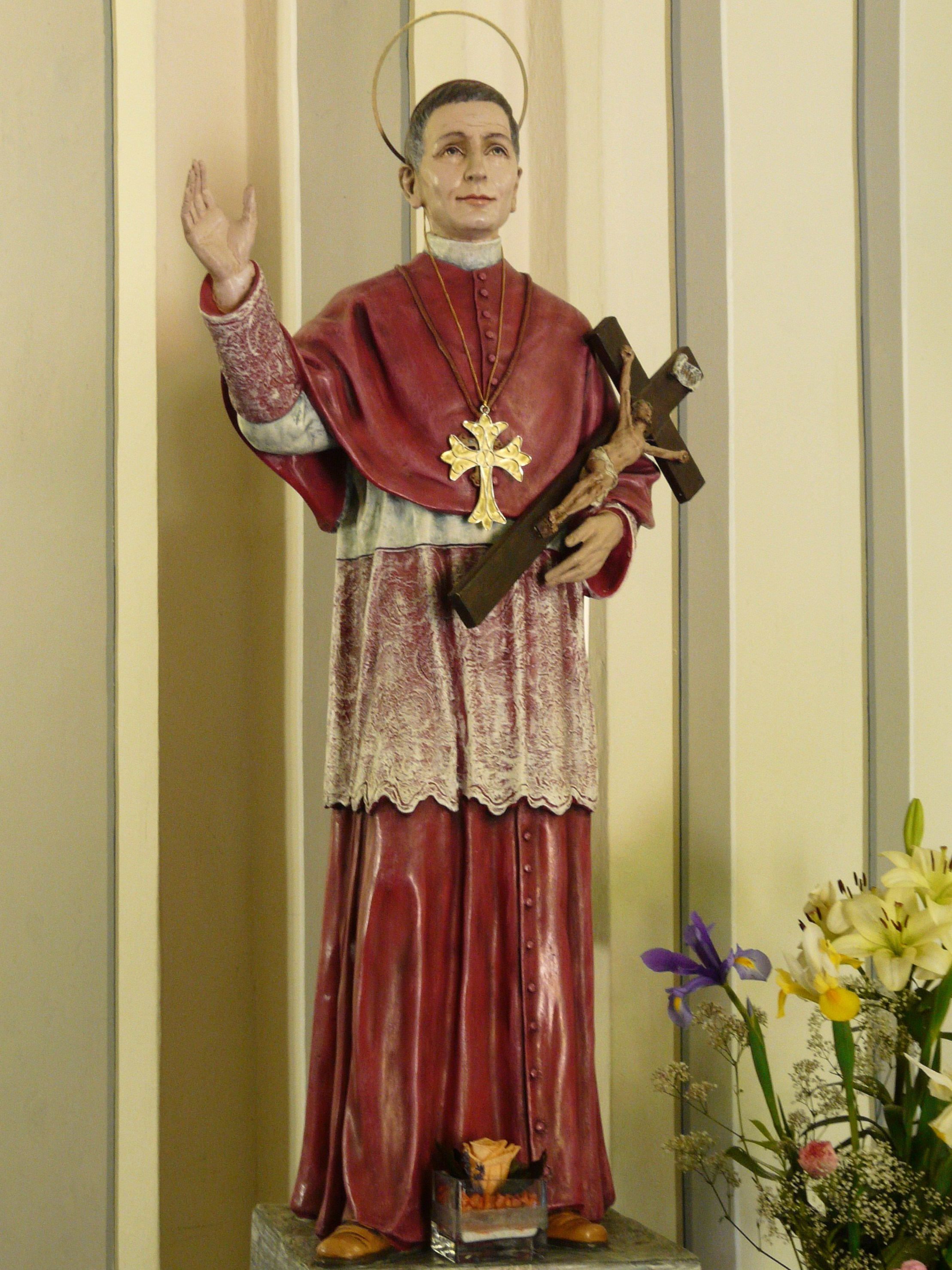 Statua del santo Antonio Maria Gianelli del santuario di Cerreta, Carro, Liguria, Italia